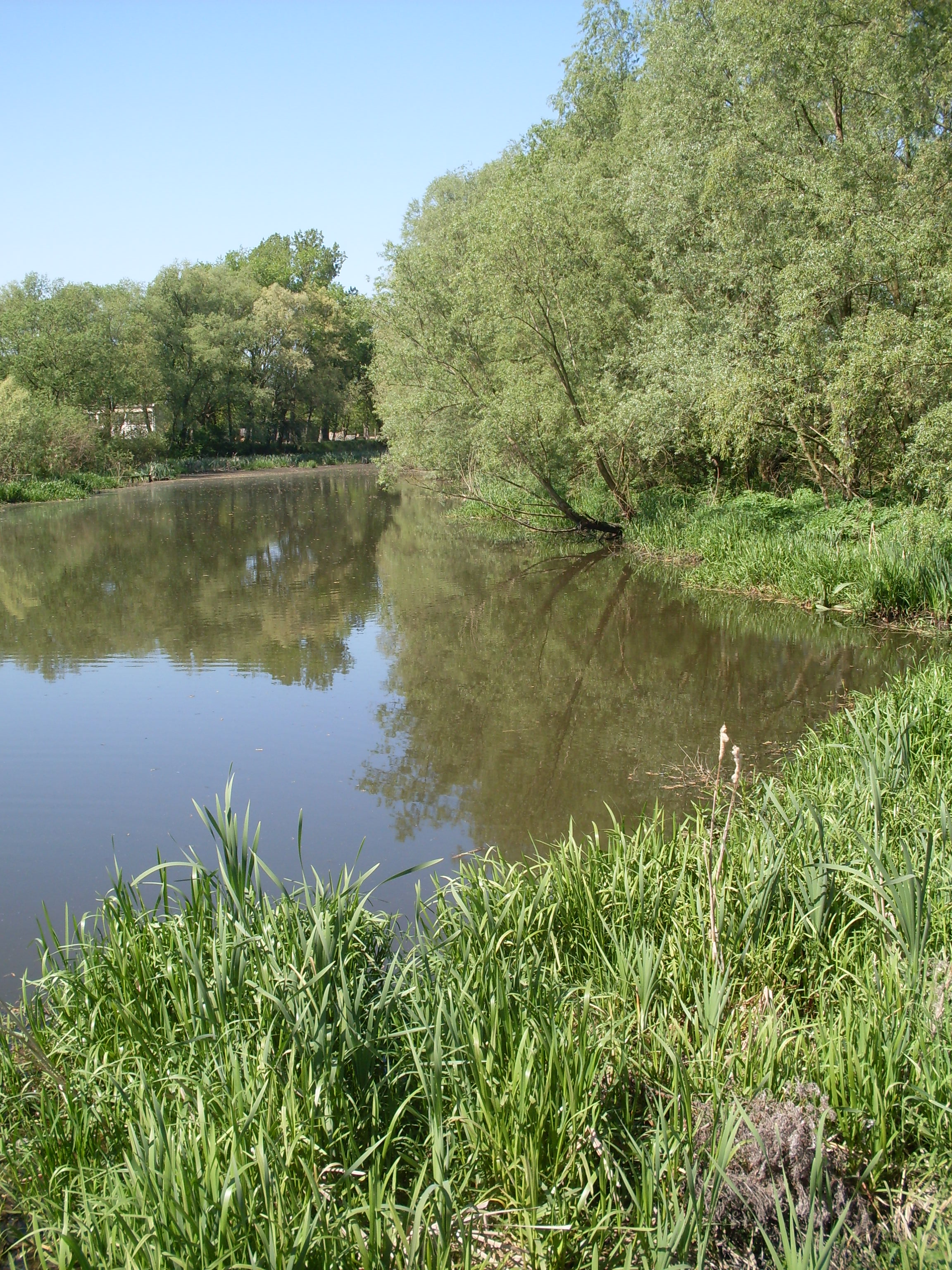 Odnoga Odry - Łarpia, Police